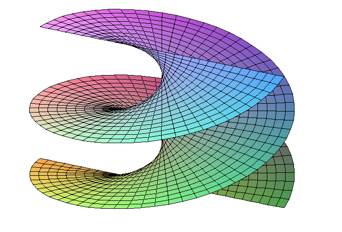 Der Helicoid